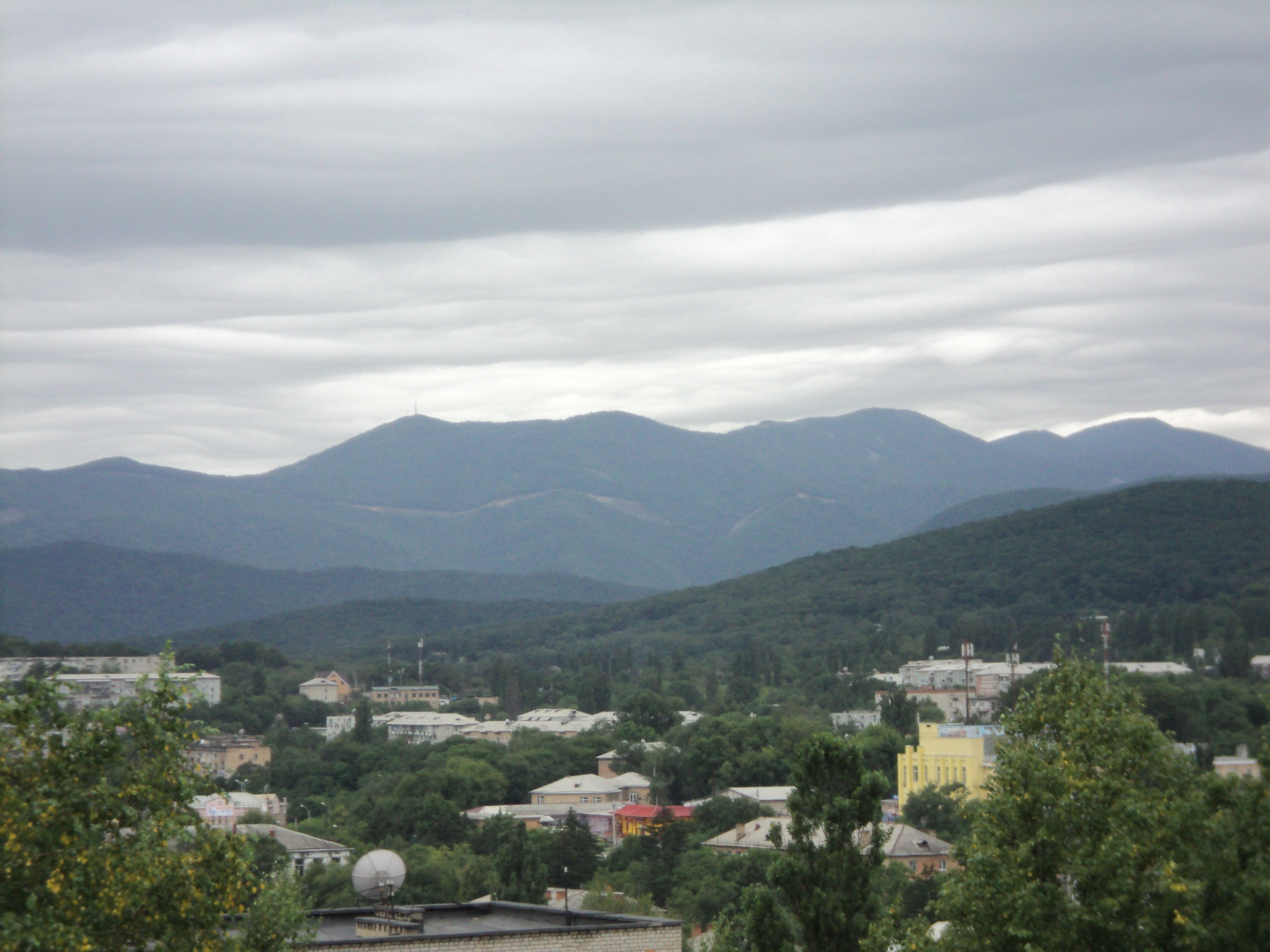 Ландшафт Партизанска